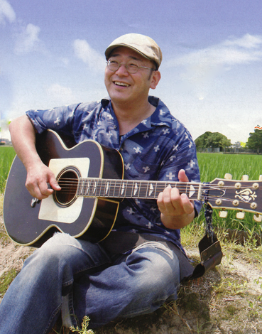 野田かつひこのプロフィール画像